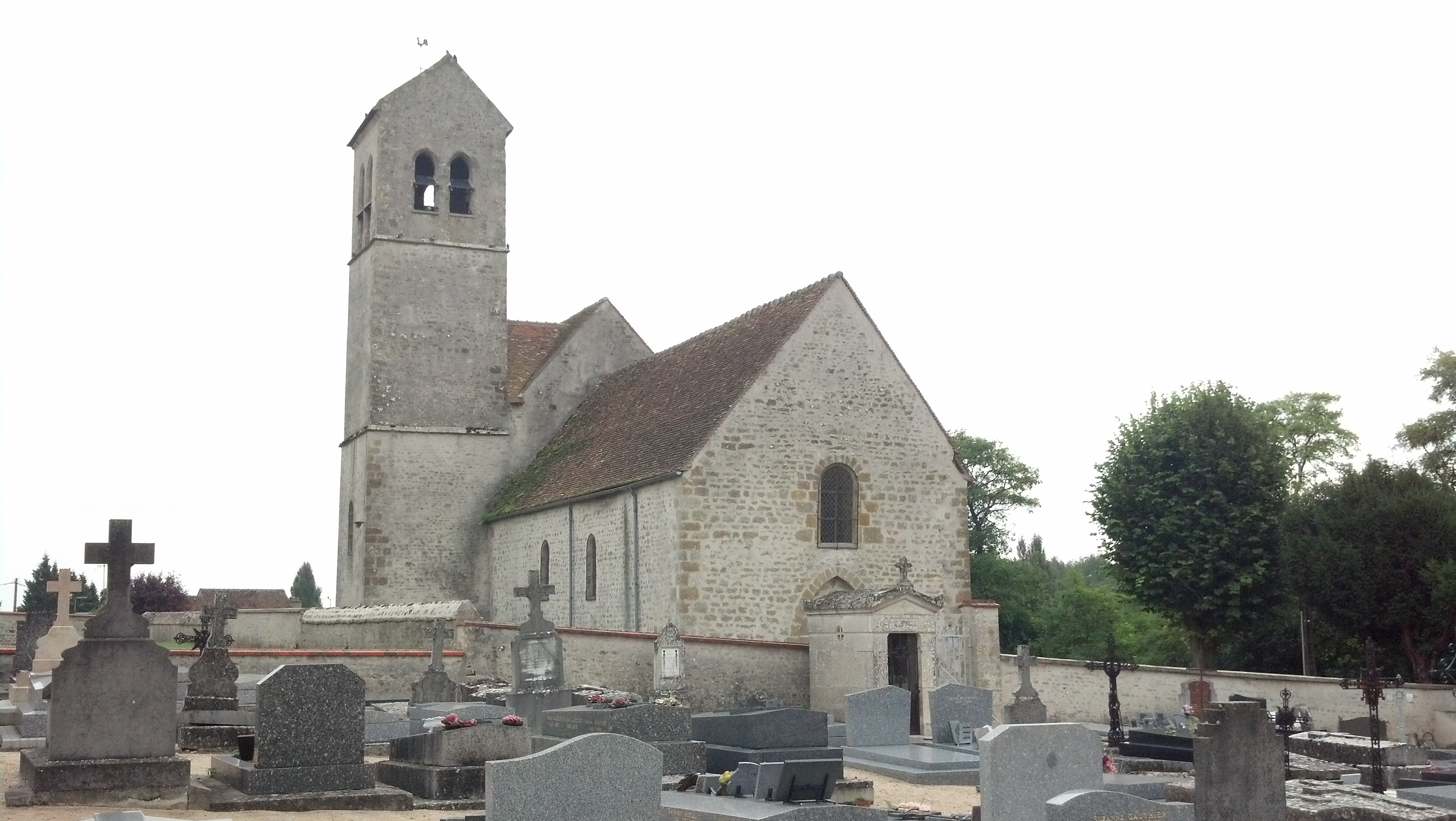 Église Saint-Aignan de Bondaroy .